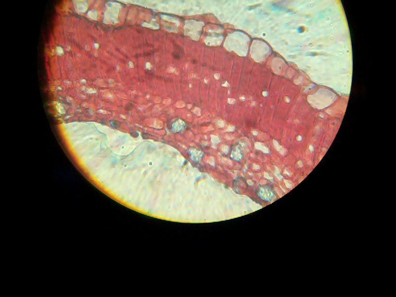 Folha observada em microscopia óptica